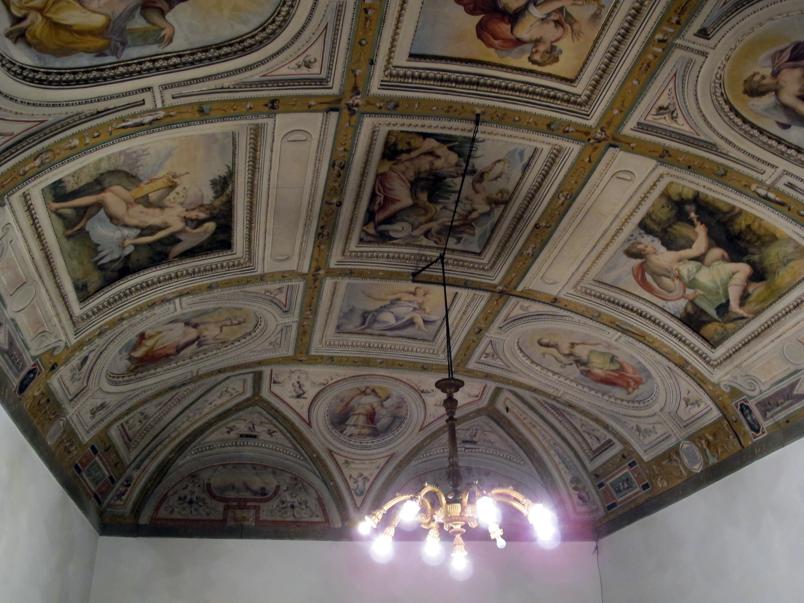 Palazzo di sforza almeni, sala con affreschi